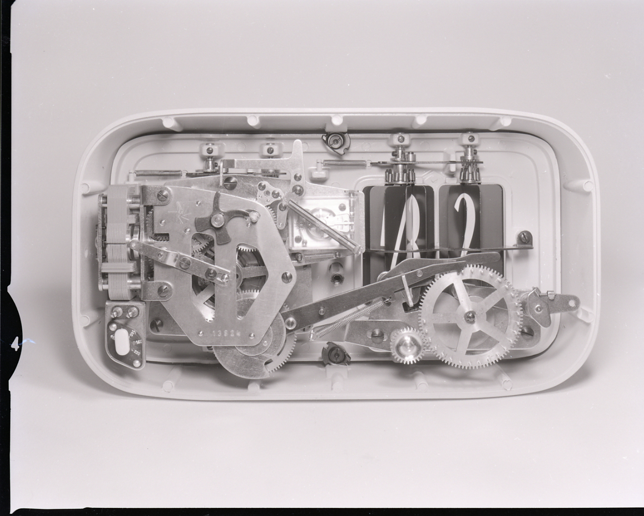 Servizio fotografico : Italia, 1965 / Paolo Monti. - Buste: 17, Fototipi: 27 : Negativo b/n, gelatina bromuro d'argento/ pellicola ; 10x12. - ((Serie costituita da 17 buste di negativi identificati con i nn.: 19703, 19704, 19705, 19706, 19707, 19708, 19709, 19710, 19711, 19712, 19713, 19714, 19715, 19716, 19717, 19718, 19719, 19720, 19721, 19722, 19723, 19724, 19725, 19726, 19727, 19728, 19729, e tenute insieme da una graffetta. - Sul coperchio della scatola iscrizione didascalica manoscritta a pennarello nero: "Radar - Orologi/ solari".